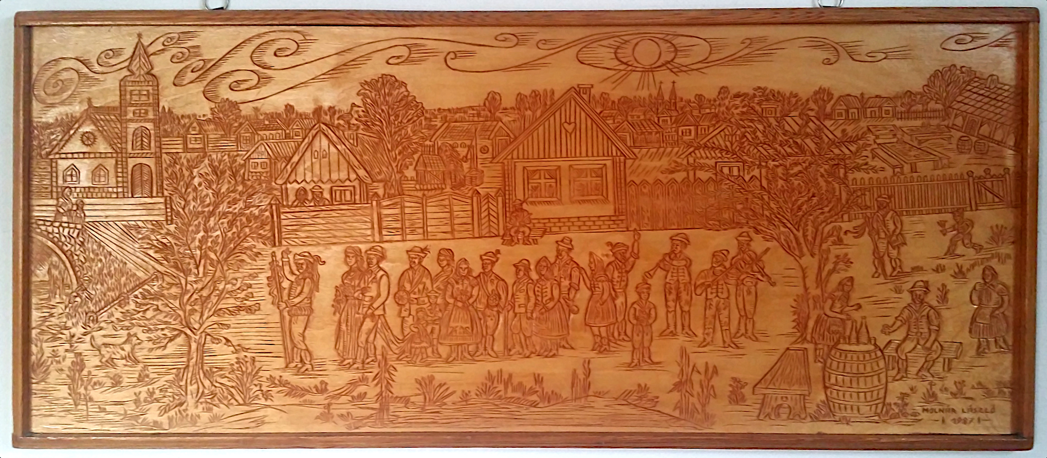 Lakodalmas menet Sárrétudvariban (ékfaragás)